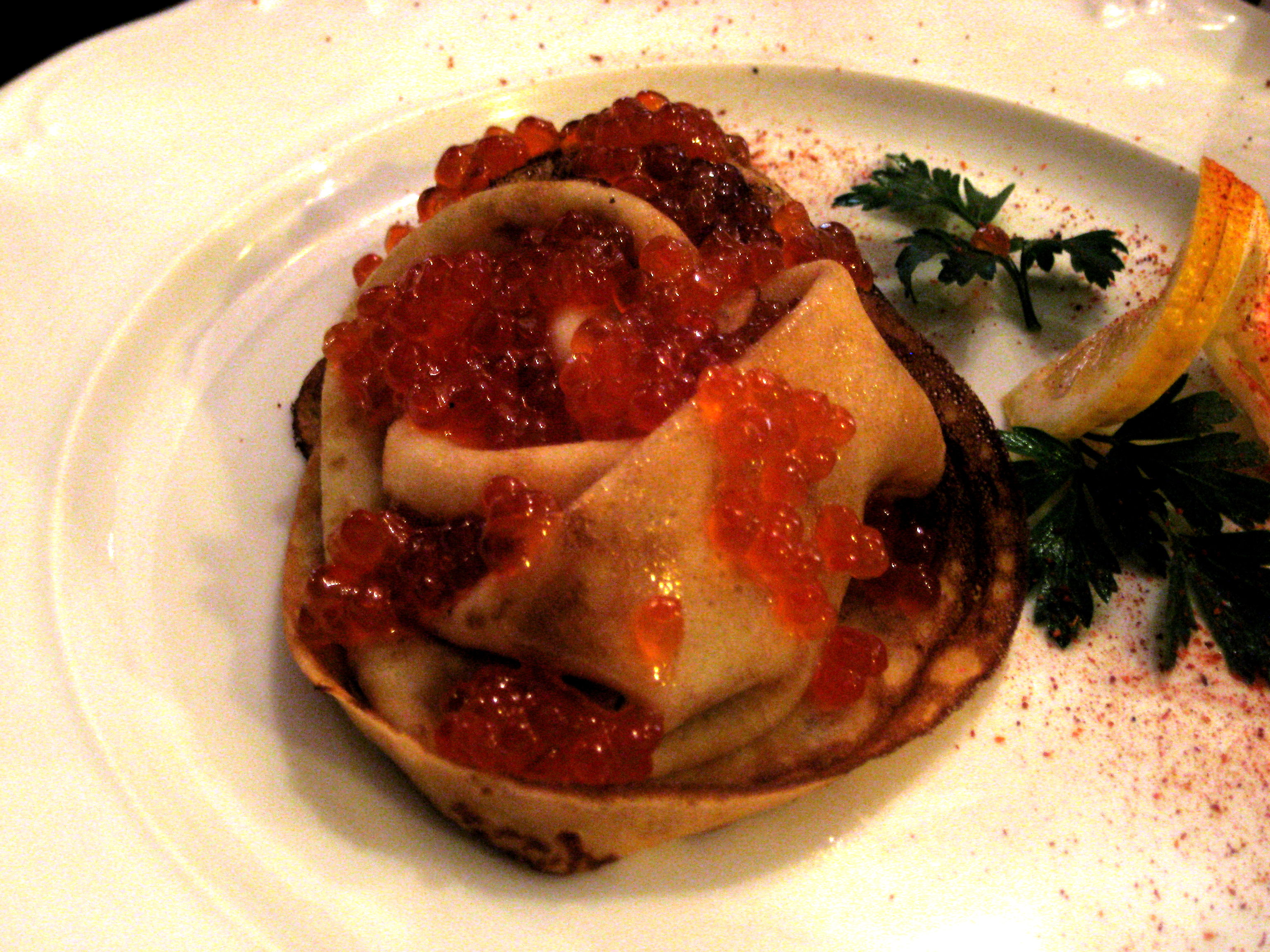 Блин с красной икрой